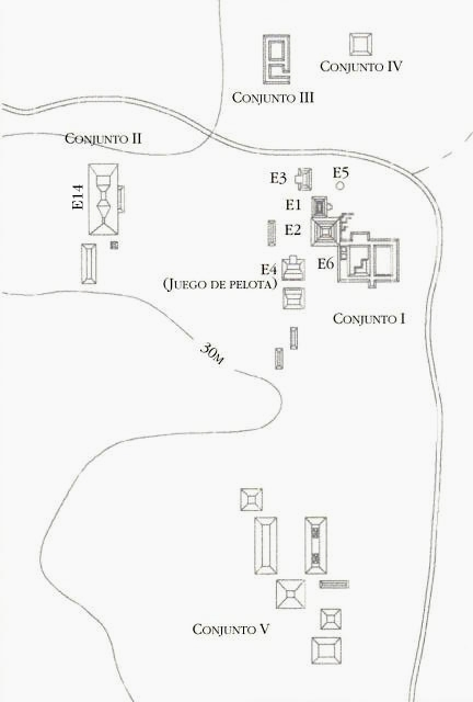 Plano de la zona arqueológica de Moral Reforma, en el municipio de Balancán, estado de Tabasco, México.